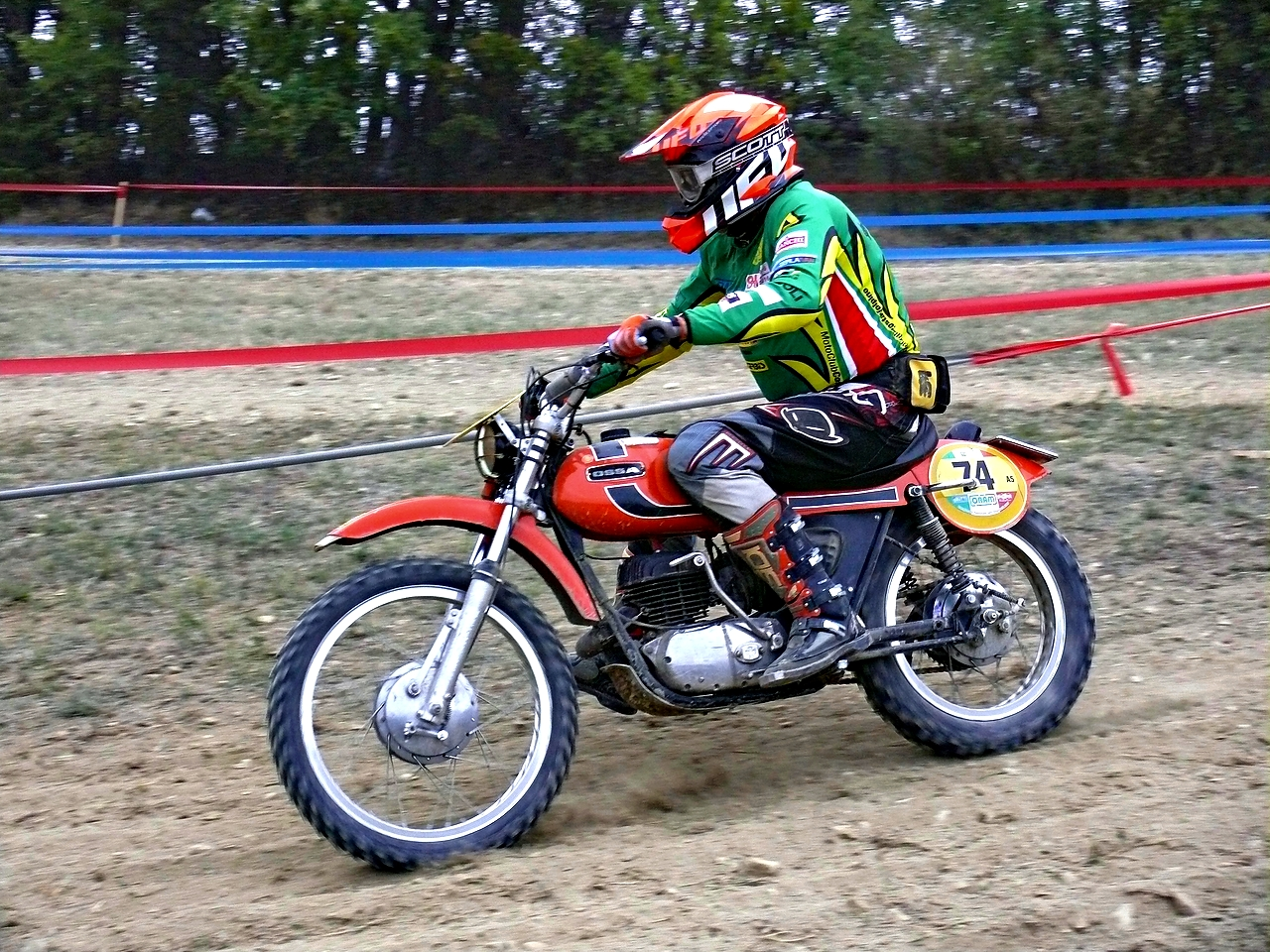 2017 Campionato Italiano Gruppo 5 Regolarità Epoca e Trofeo Testori. 7° Prova - Perino (PC) - Italia.